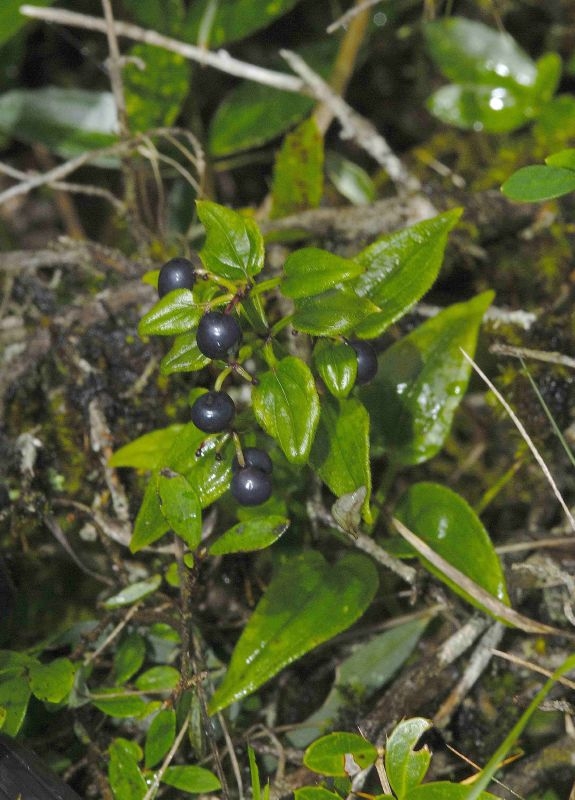 茜草科 茜草屬 直立紅藤草 (全株) 石門山